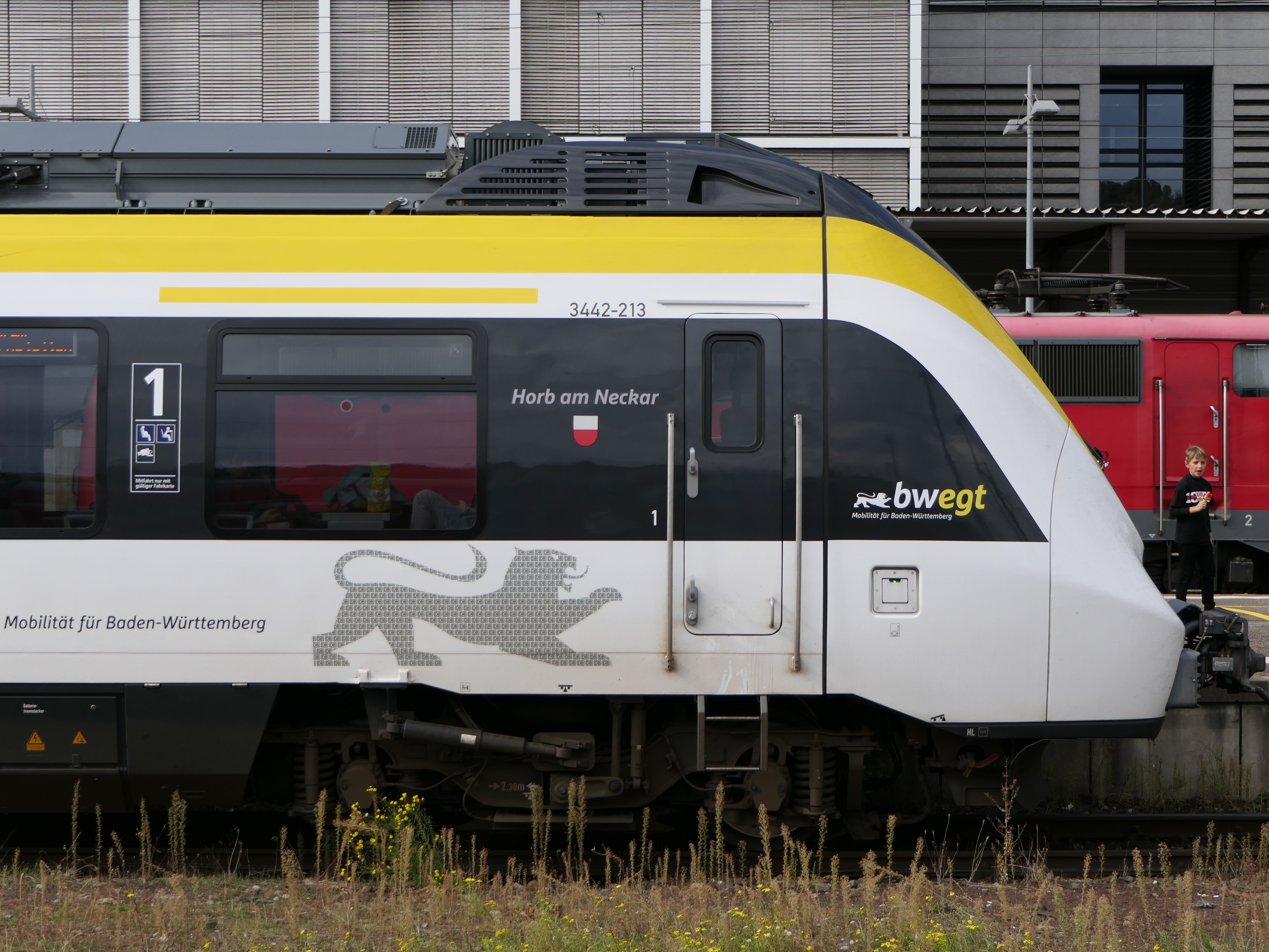 Elektrotriebwagen der Baureihe 442, bzw. vom Typ Talent 2 des Herstellers Bombardier, am Stuttgarter Hauptbahnhof. Getauft wurde dieser ET in den "bwegt"-Farben auf den Namen Horb am Neckar.